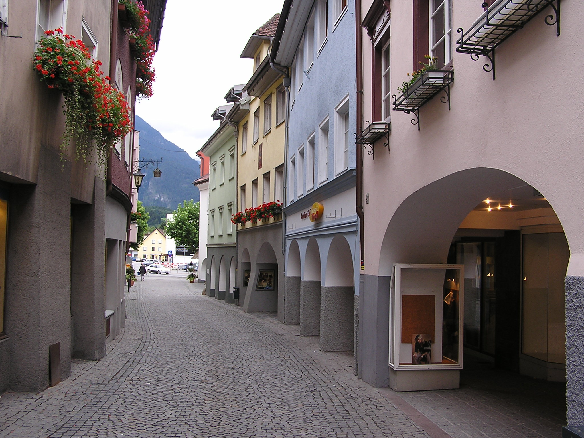 Werdenbergerstrasse Ort & Datum: 05.08.2006